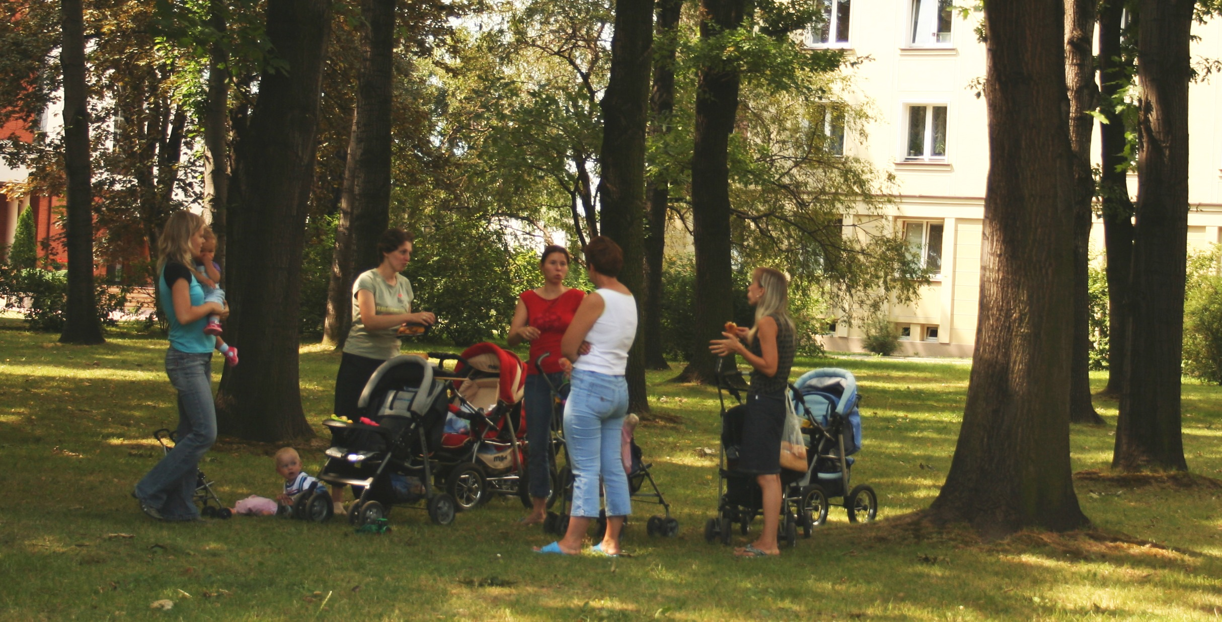 Matki z dziećmi na spacerze w parku w Rzeszowie